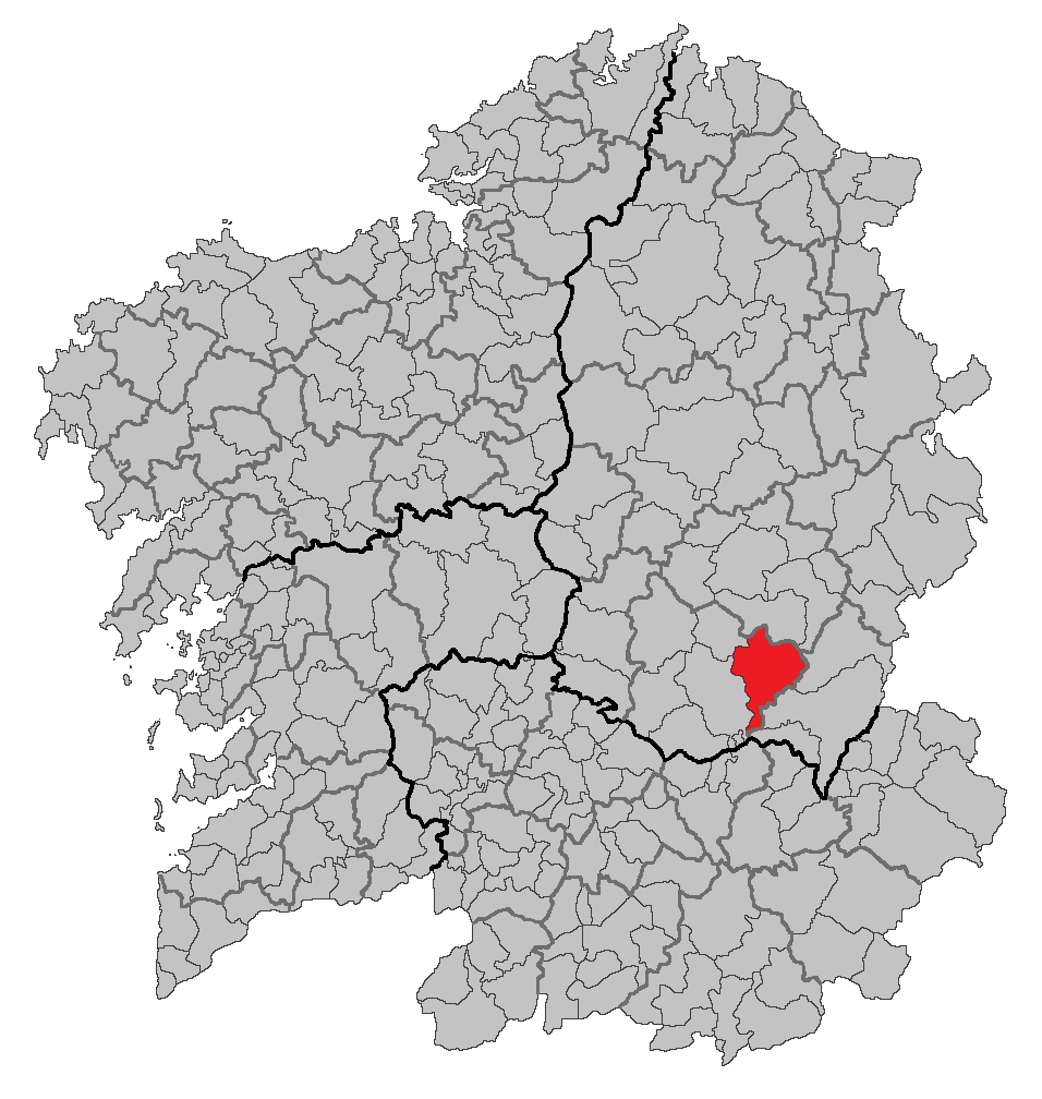 Mapa coa localización do concello de A Pobra do Brollón.